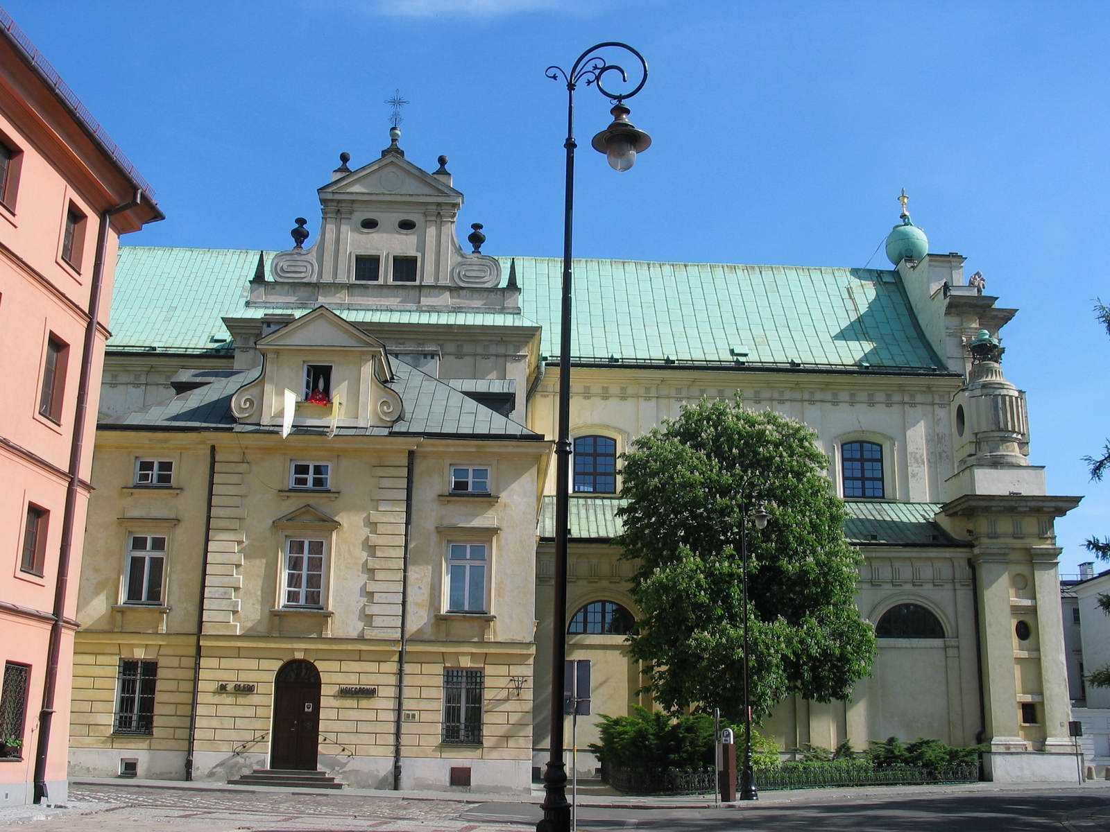 Kościół Karmelitów w Warszawie przy ul. Krakowskie Przedmieście